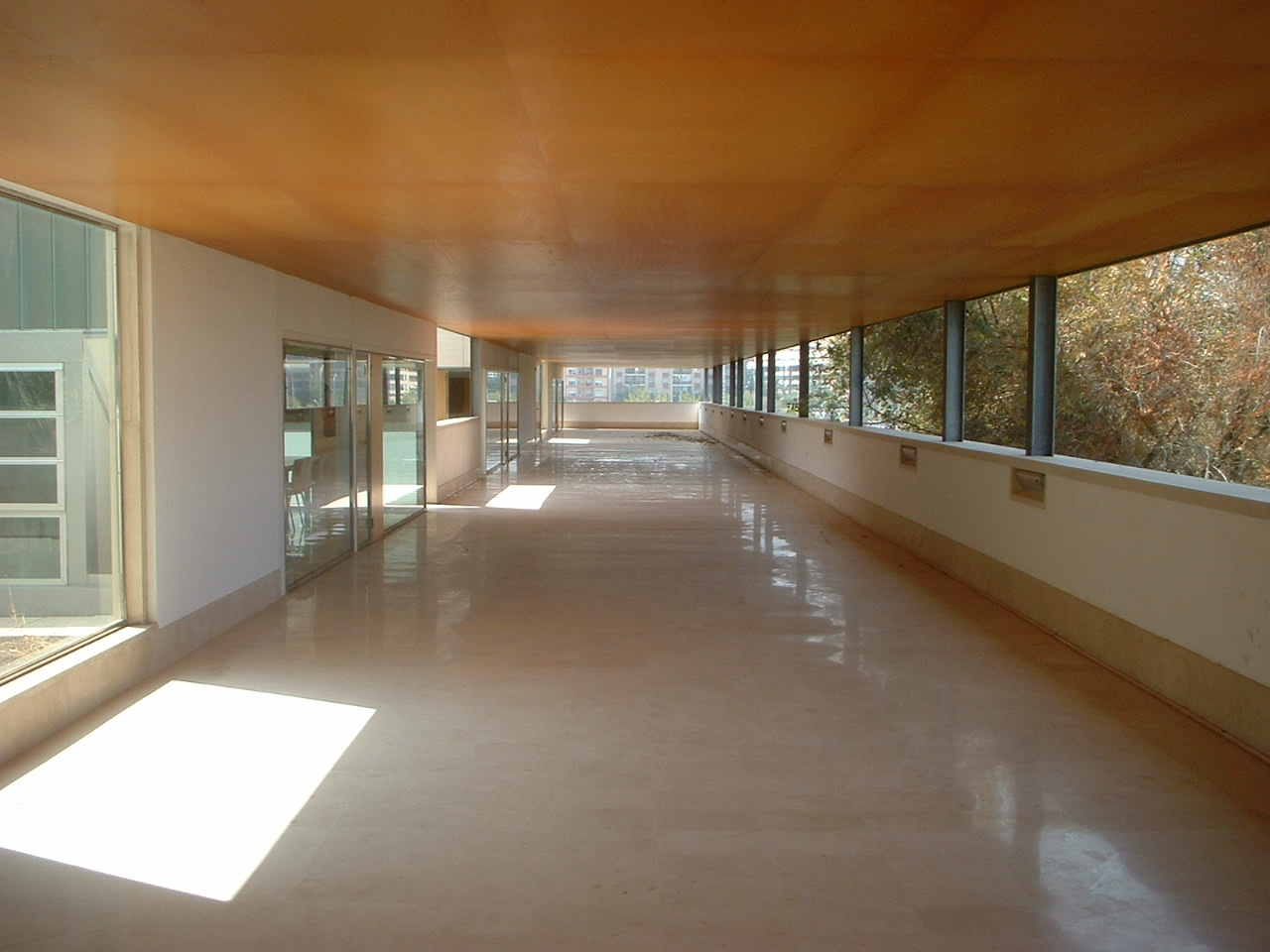 escuela técnica superior de arquitectura universidad politecnica de valencia